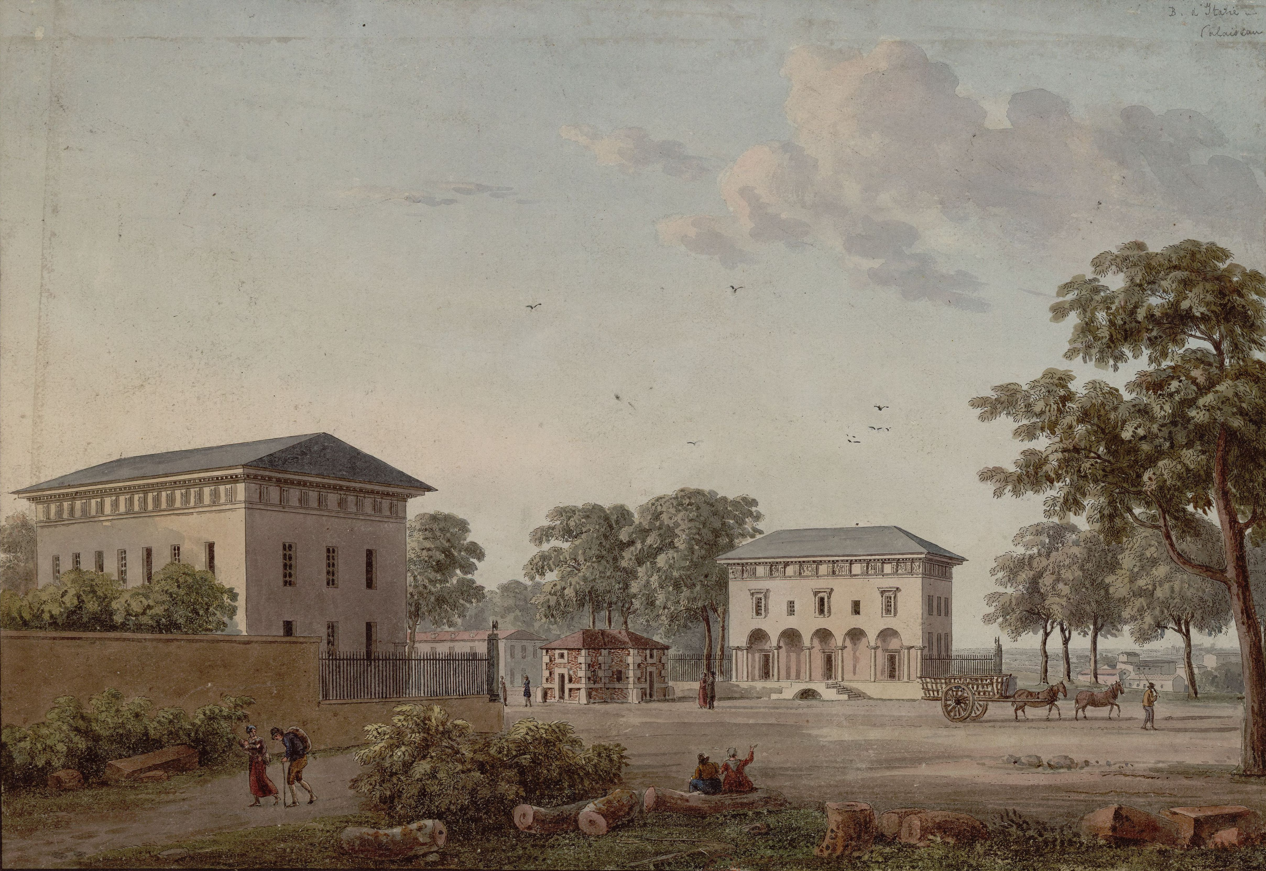 Barrière d'Italie (barrière d'octroi). Paris, 3e arrondissement. Eau-forte aquarellée.